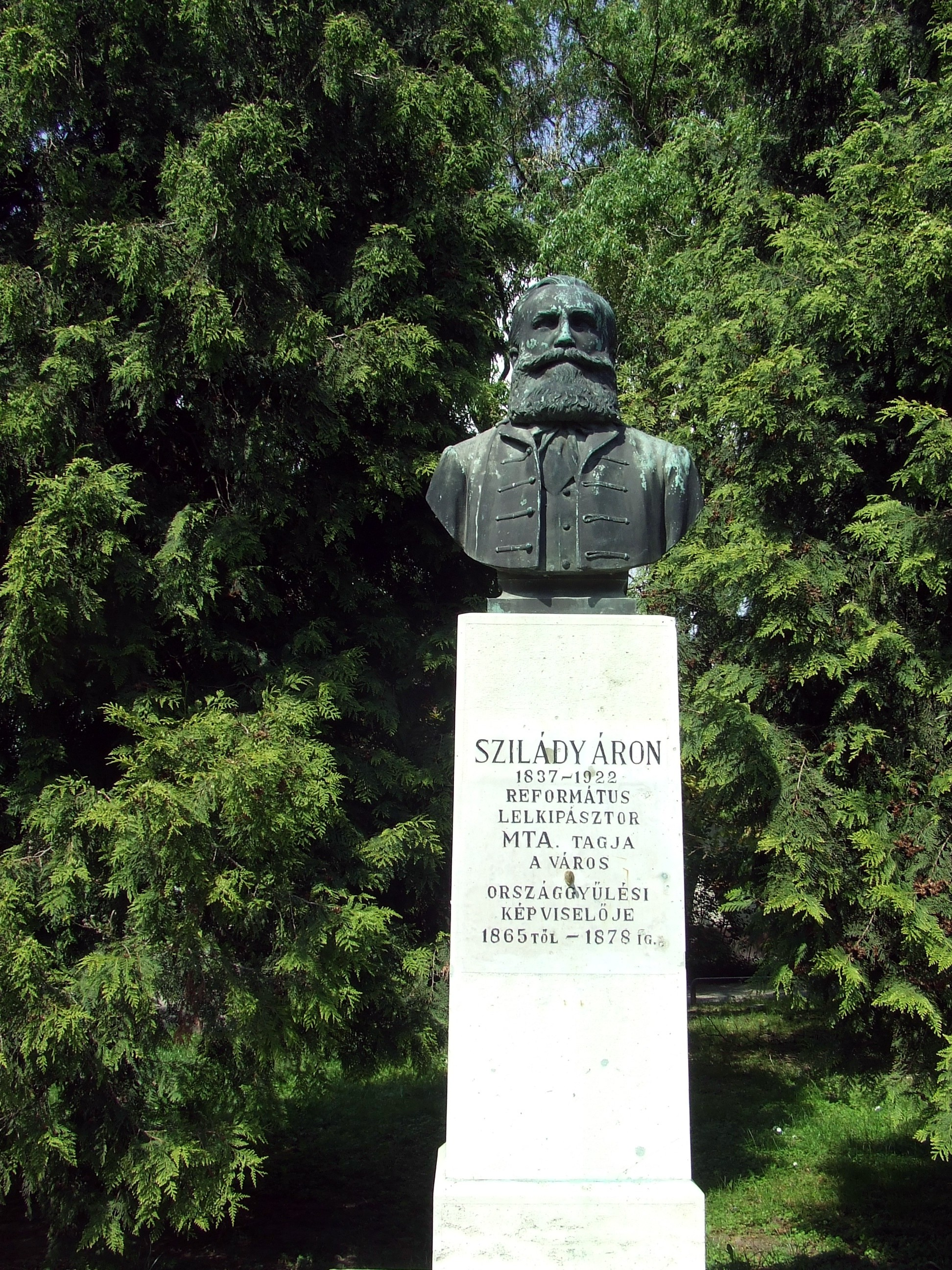 Szilády Áron (1837–1922) református lelkipásztor, irodalomtörténész, nyelvész, orientalista, országgyűlési képviselő, a Magyar Tudományos Akadémia tagja szobra Kiskunhalason. Szentgyörgyi István szobrászművész alkotása (1926)